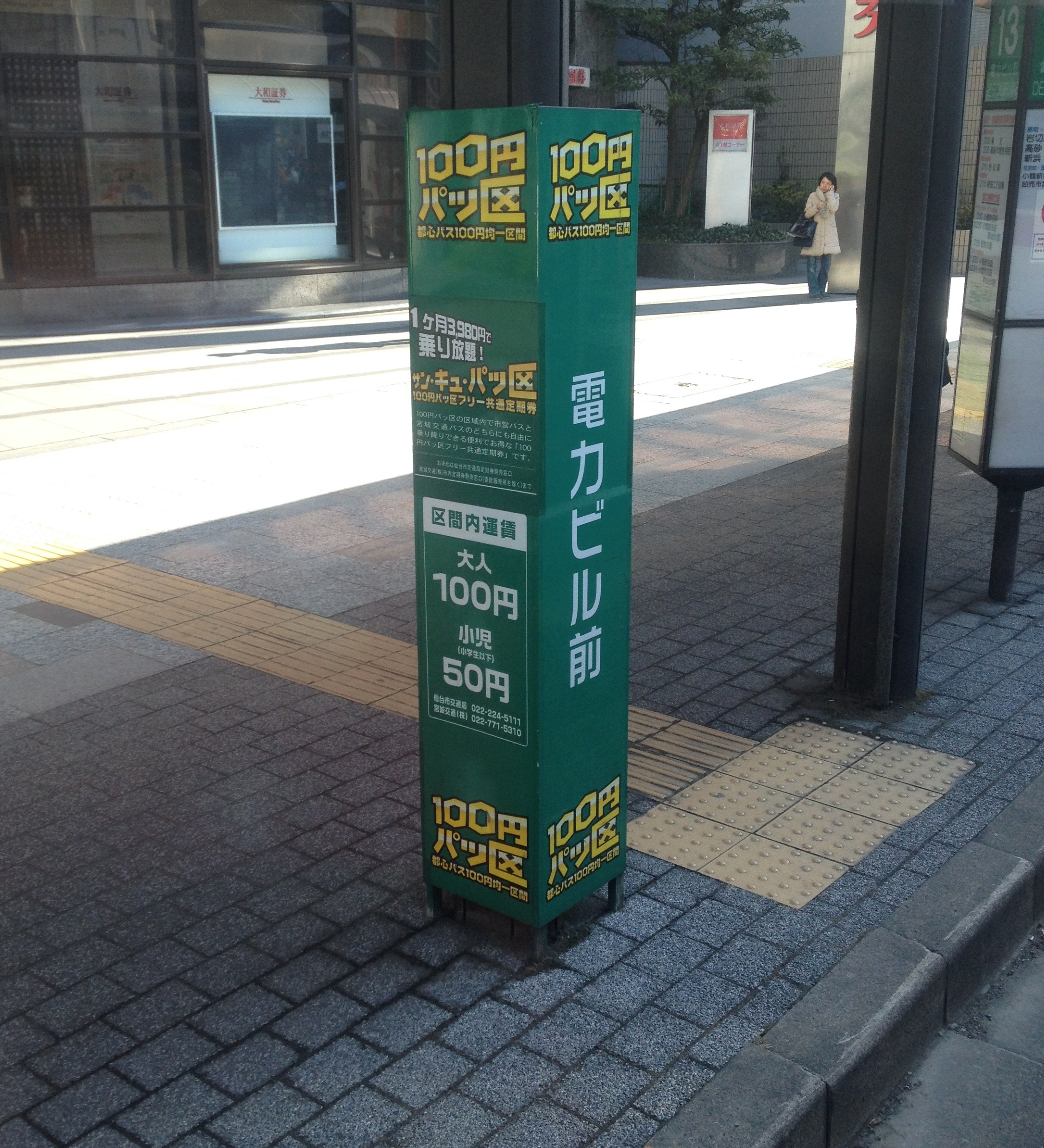 100円パッ区の掲示例（電力ビル前バス停）